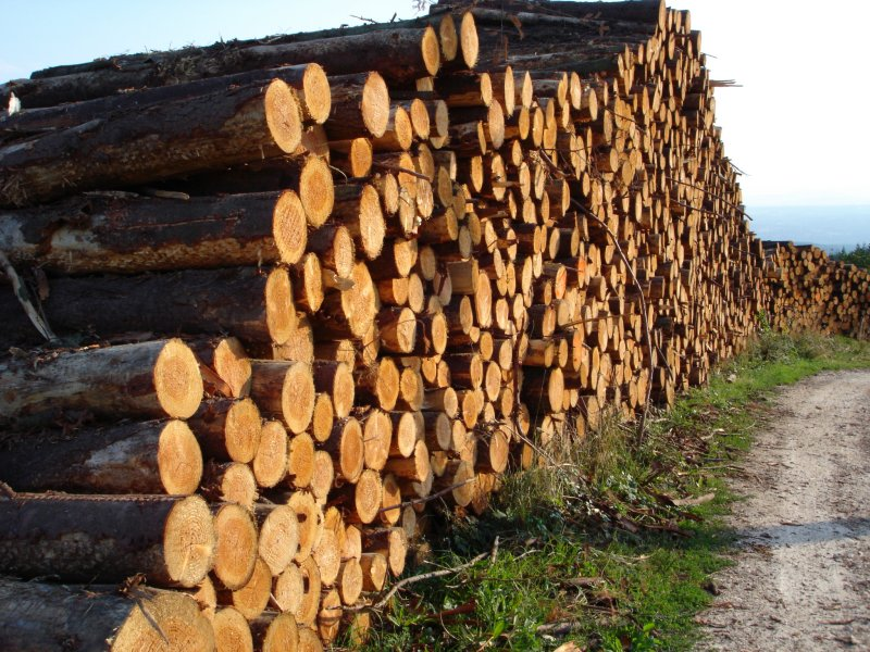 Empilement de grumes en attente d'équarrissage